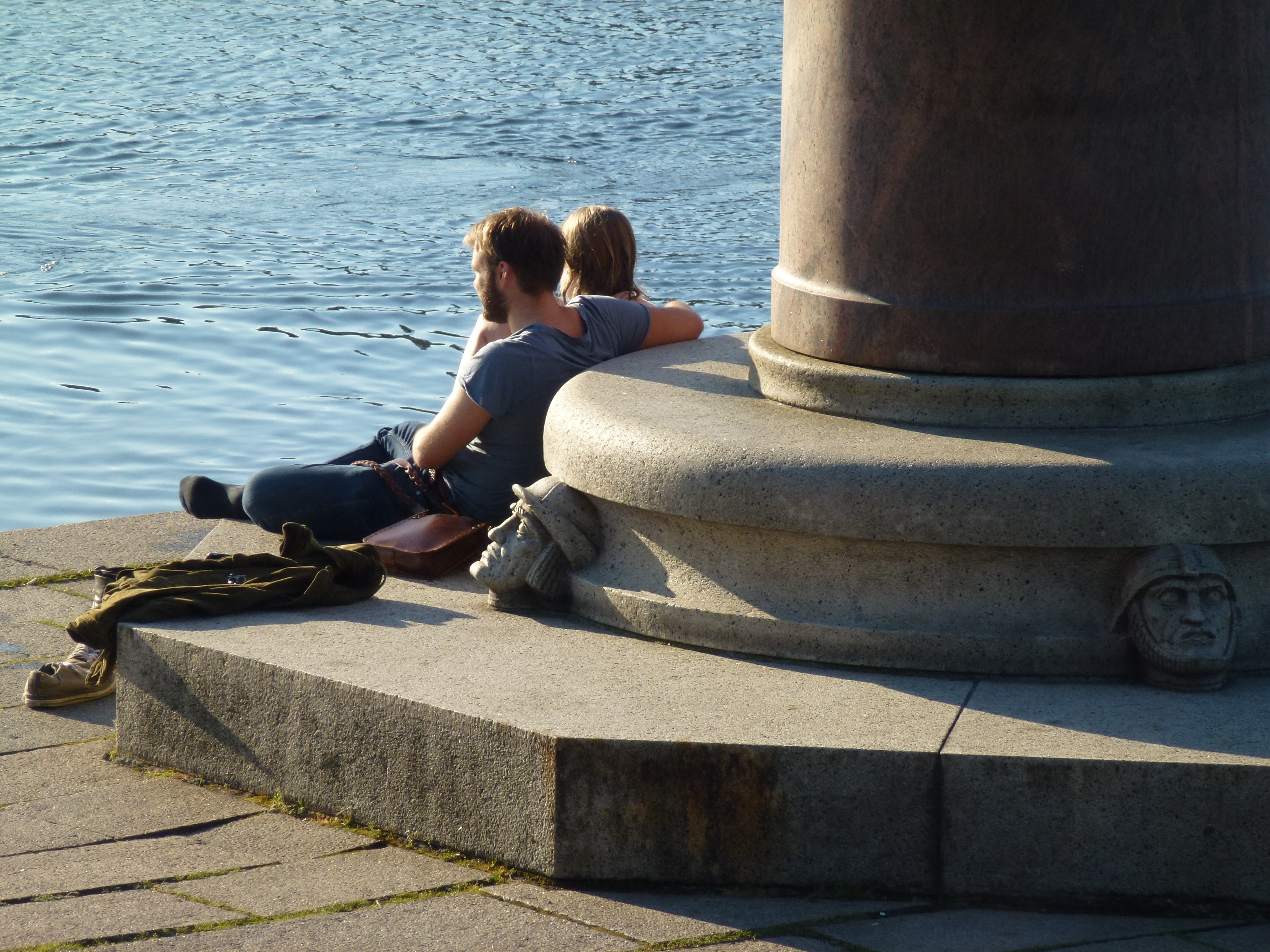 Engelbrekstatyn, sockel